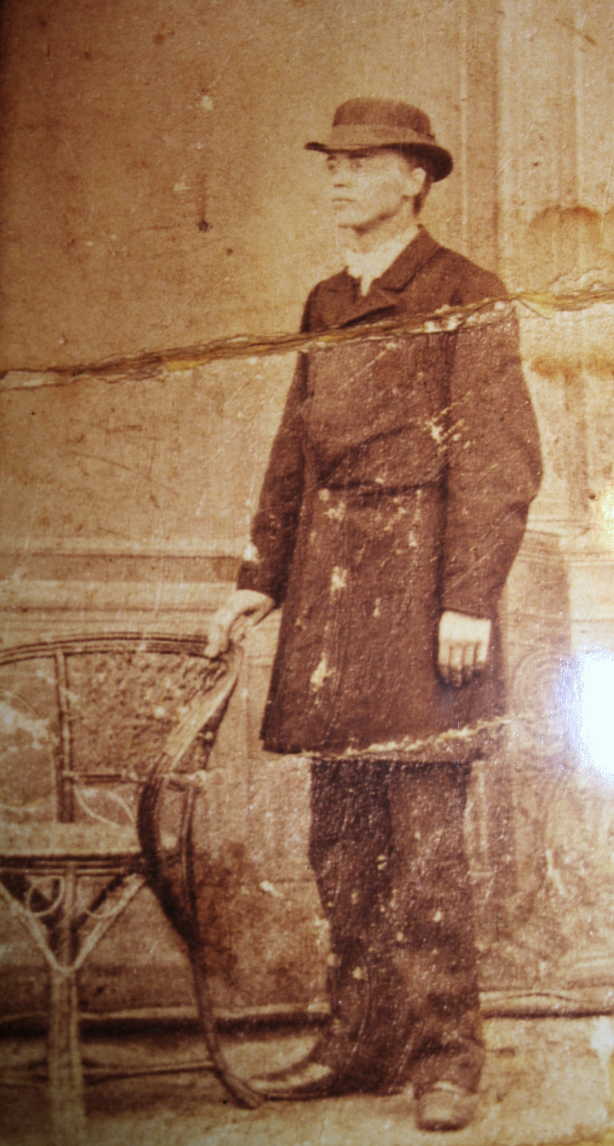 Carl Eitz als junger Erwachsener